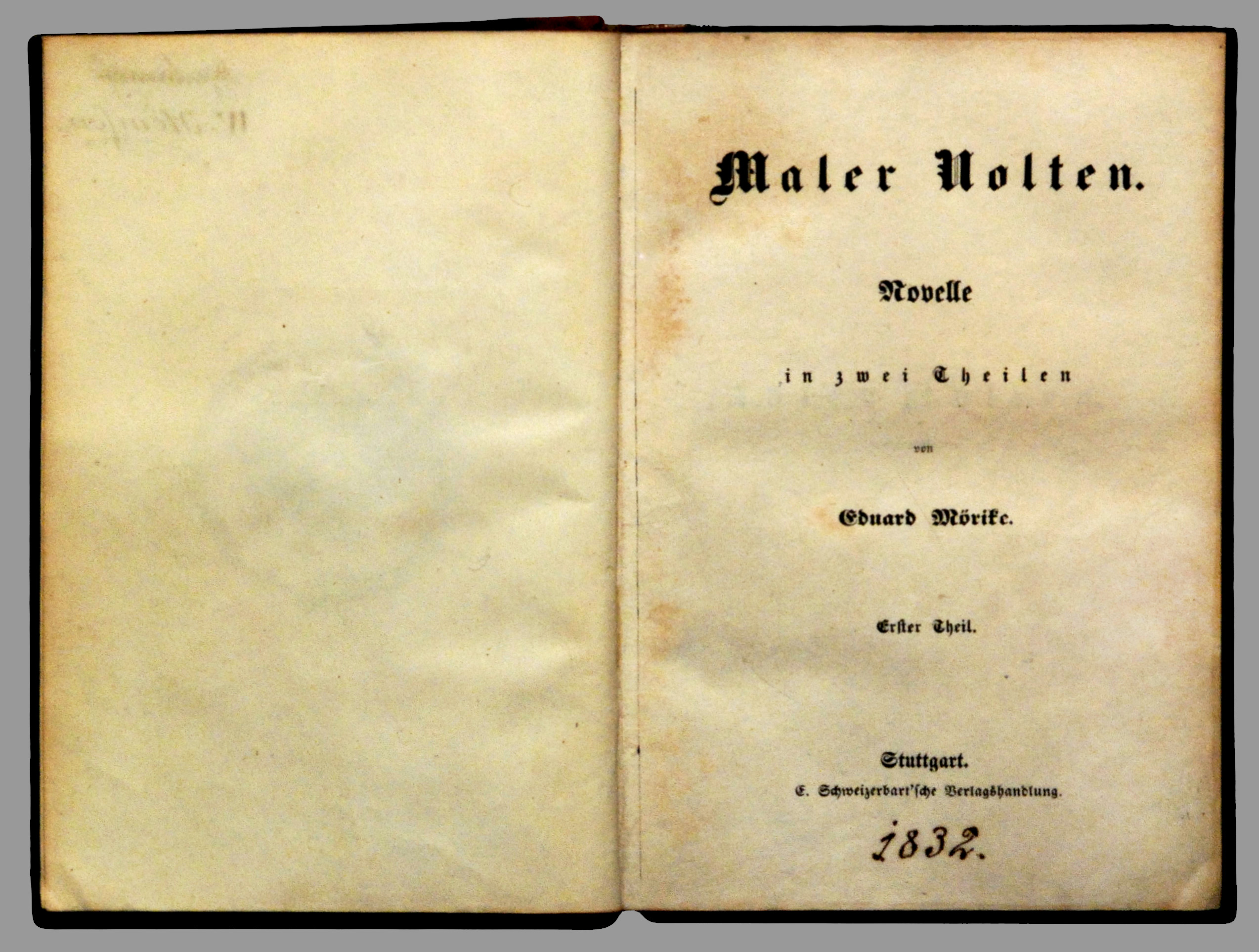 Mörike, Eduard: Maler Nolten. Novelle in zwei Theilen. Bd. I: 324 S., Bd.: 323 – 640 S. [fehlerhafte Paginierung] Stuttgart: Schweizerbart [1832]. Urdruck der Erstausgabe (kenntlich an dem noch fehlenden Hinweis auf die Musikbeilagen auf dem Titel).